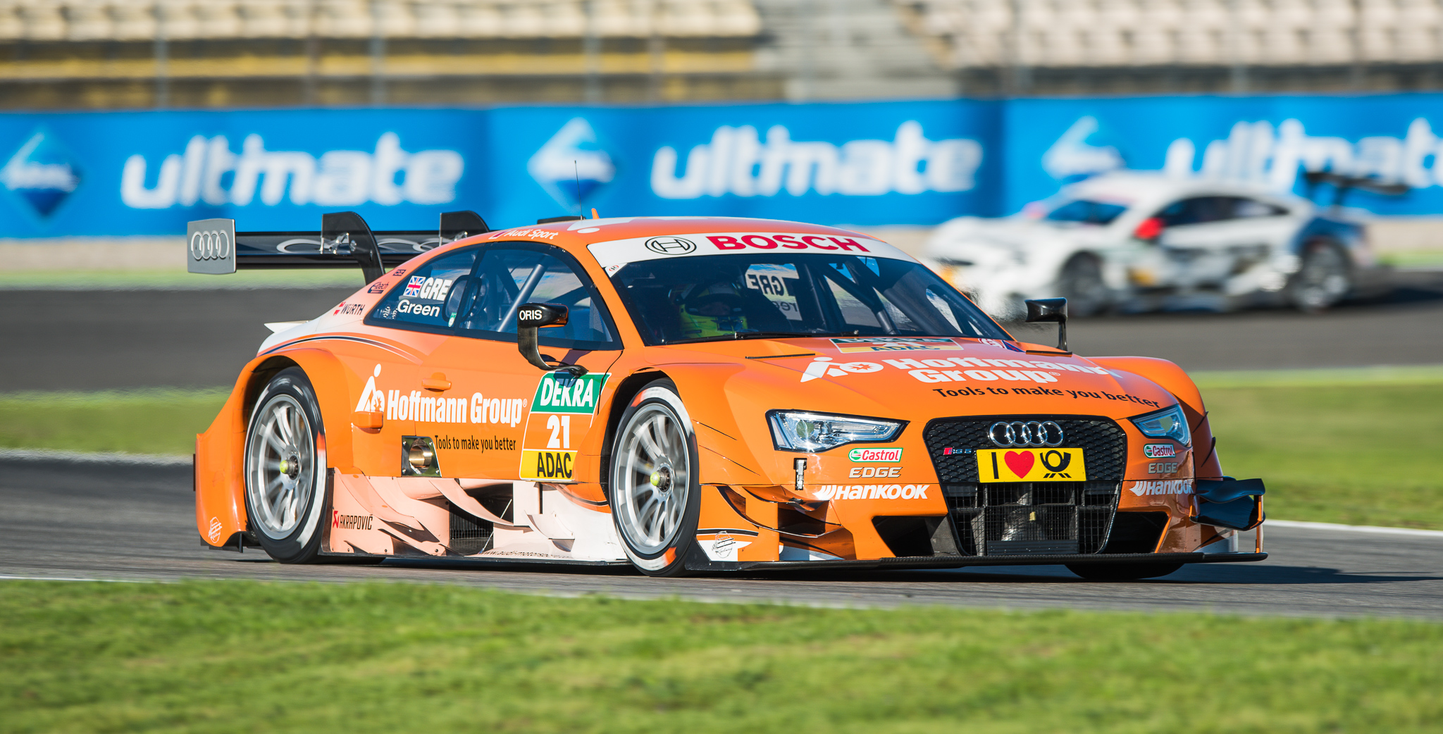 DTM,Deutsche Tourenwagen Masters,Hockenheimring,Hoffmann Group Audi RS 5 DTM,Jamie Green,Motorsport,Team Rosberg GmbH